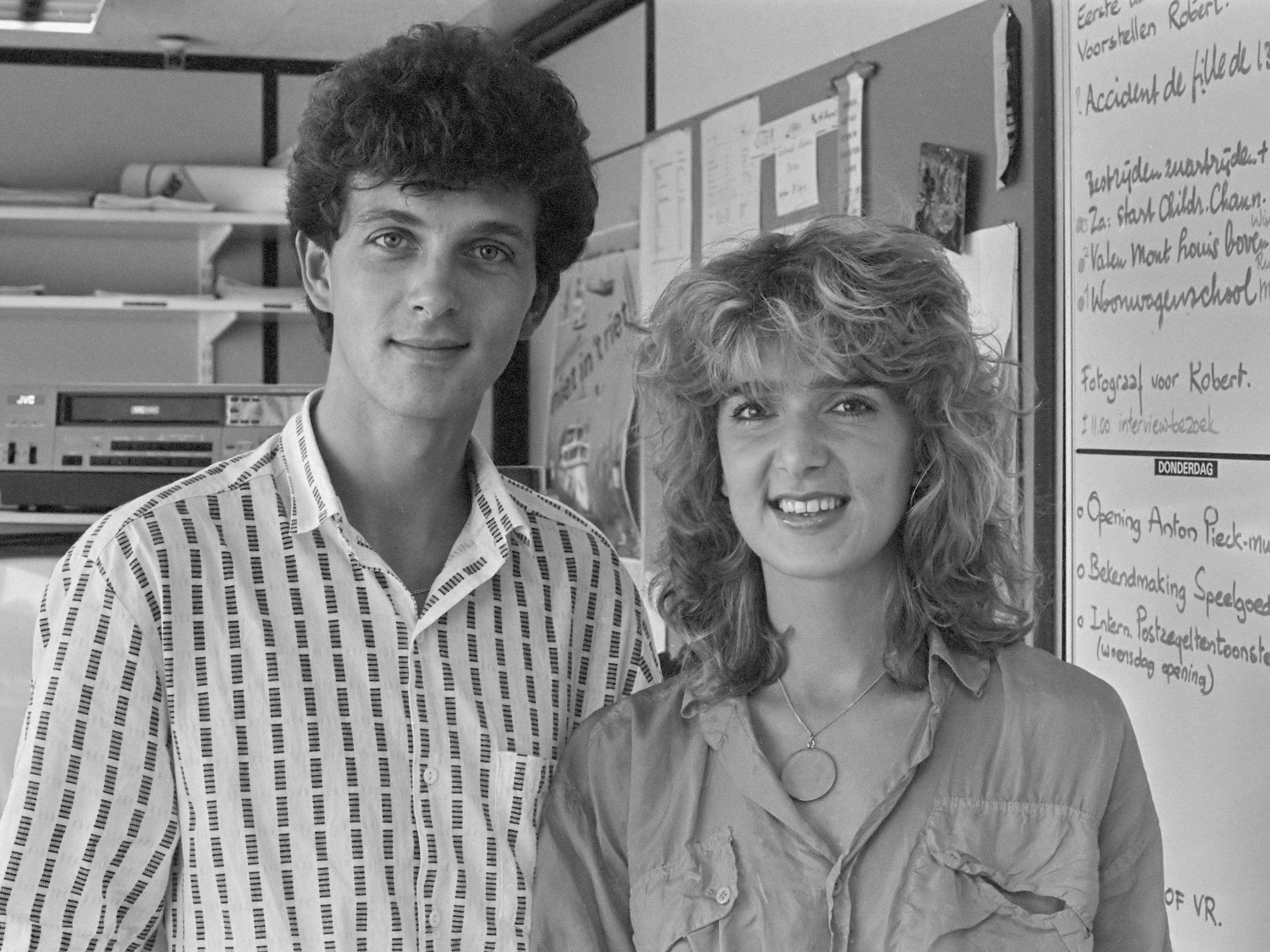 Naast Leonie Jansen nu ook Robert ten Brink als presentator in het Jeugdjournaal